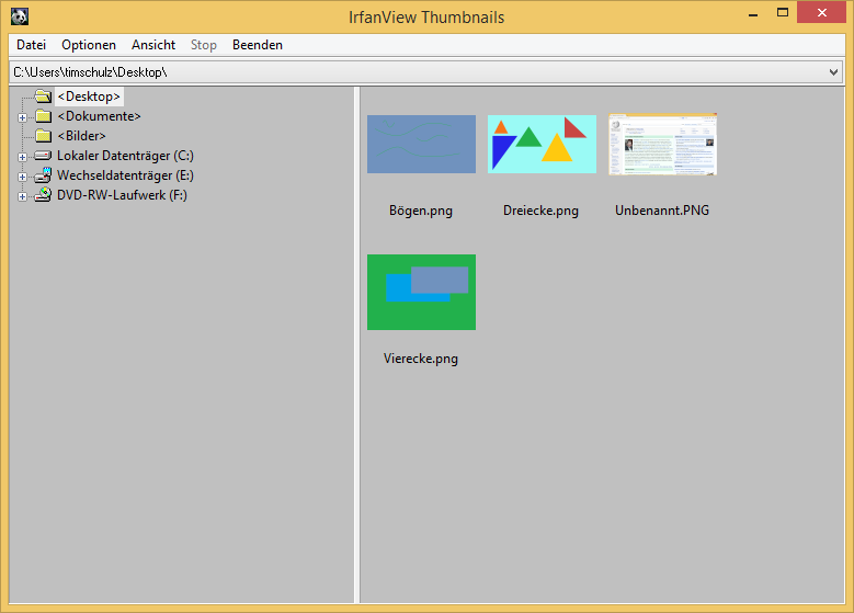 Deutscher Screenshot von IrfanView Thumbnails 4.38 unter Windows 8.1 (IrfanView)